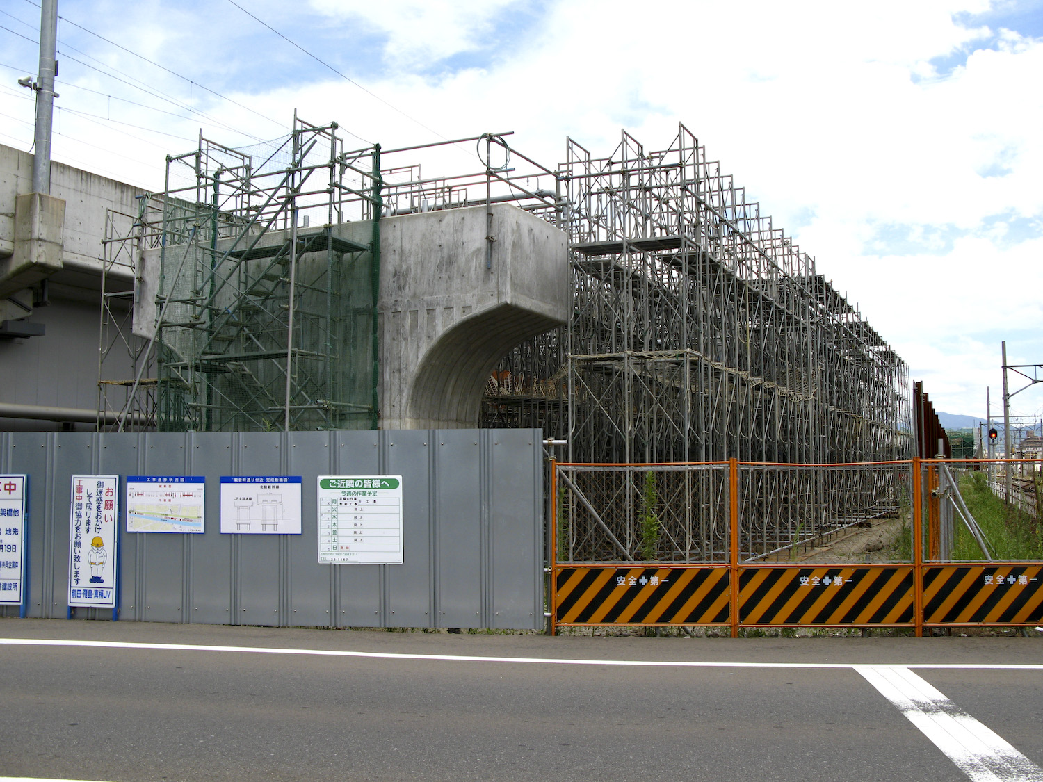 Construction site for Hokuriku Shinkansen, near Fukui Station, Fukui, Fukui Prefecture, Japan